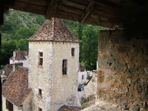 Photographie prise depuis le clocher de l'Eglise fortifiée de Saint-Martin-de-Vers. La tour que l'on voit est ladite "Maison des Templiers". Cliché : Antoine Carette, Juillet 2006. Licensing Cliché : Antoine Carette, juillet 2006.